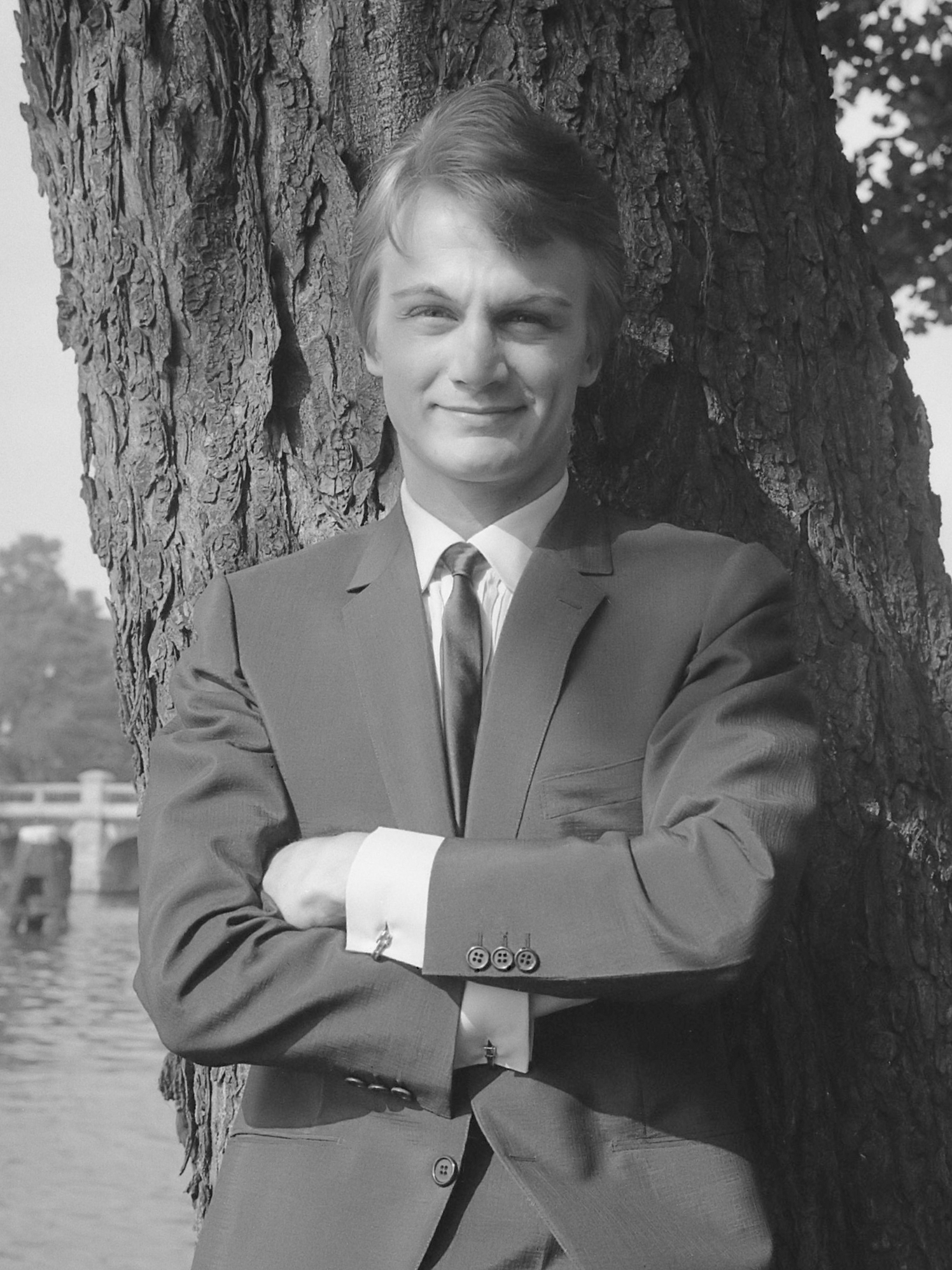 Claude Francois gaf persconferentie in Amstelhotel in de tuin, Claude Francois (kop) 1 oktober 1965